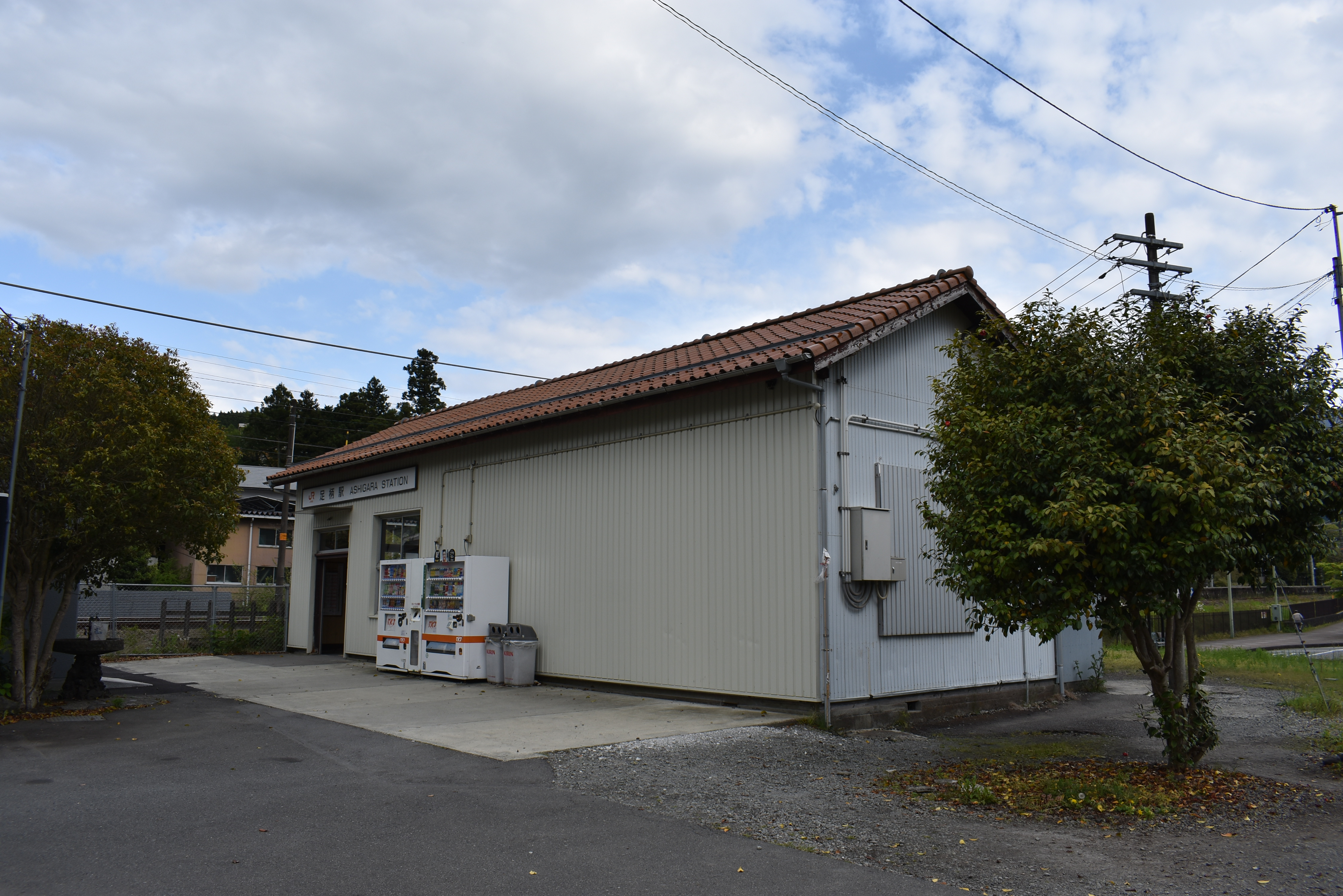 JR東海御殿場線、足柄駅駅舎です。